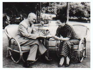 1955年（中華民國44年）蔣中正與宋美齡。